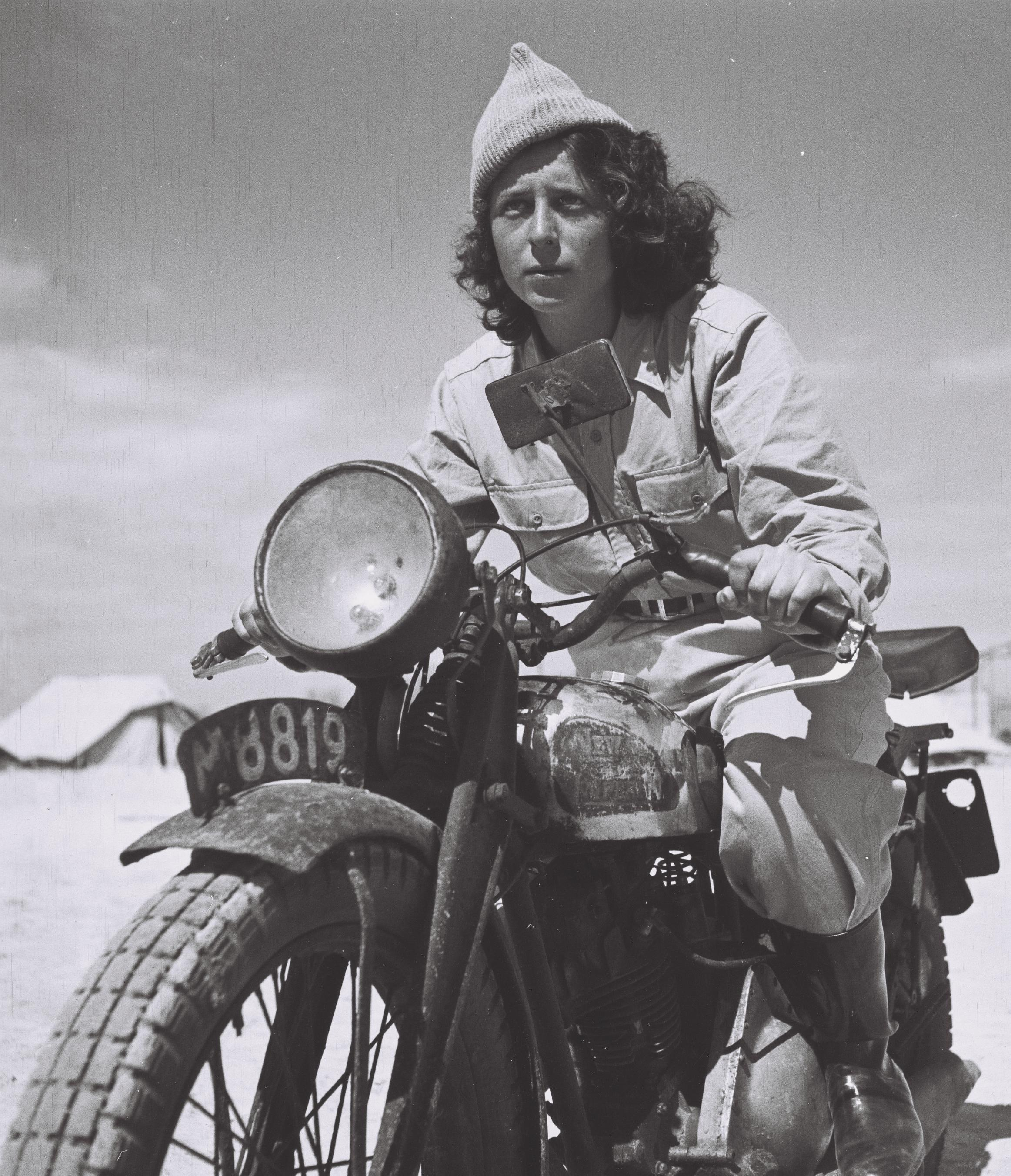 חברת ארגון ההגנה על אופנוע